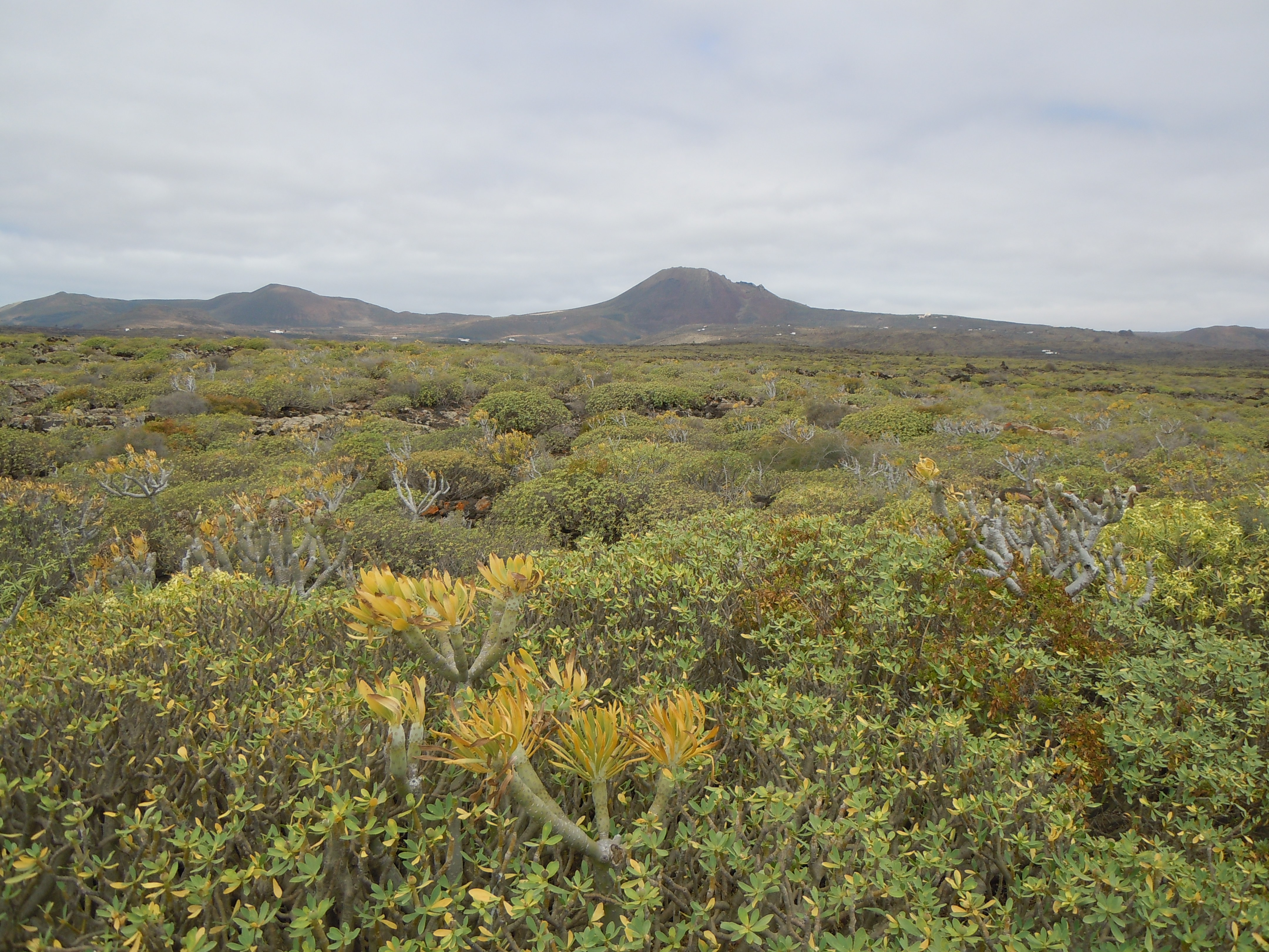 Malpais de la Corona depuis la Cueva de los Verdes, Harìa, Lanzarote: maquis à Euphorbia balsamifera et Kleinia neriifolia